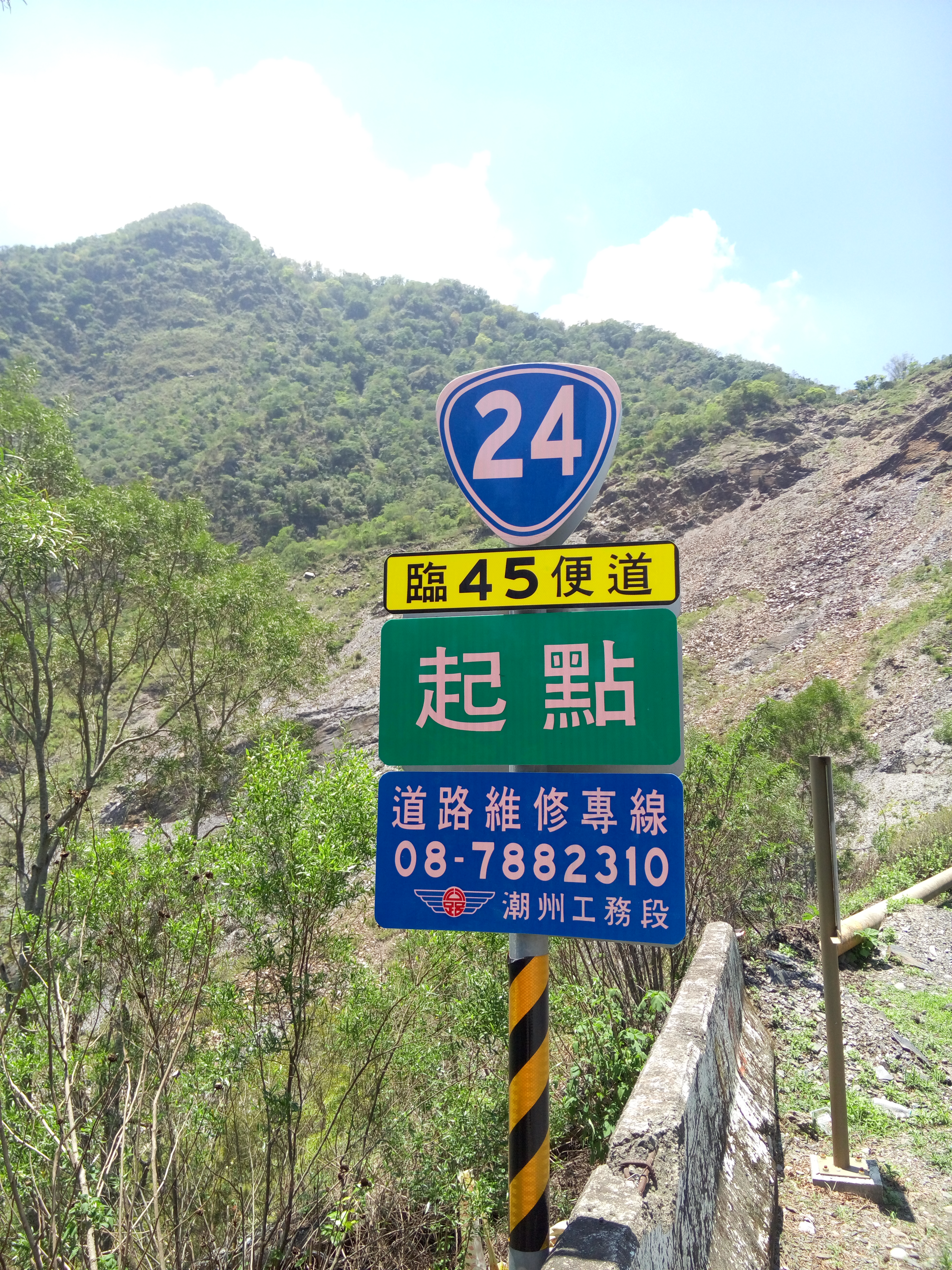 中文（台灣）: 屏東縣霧台鄉阿禮部落小鬼湖林道